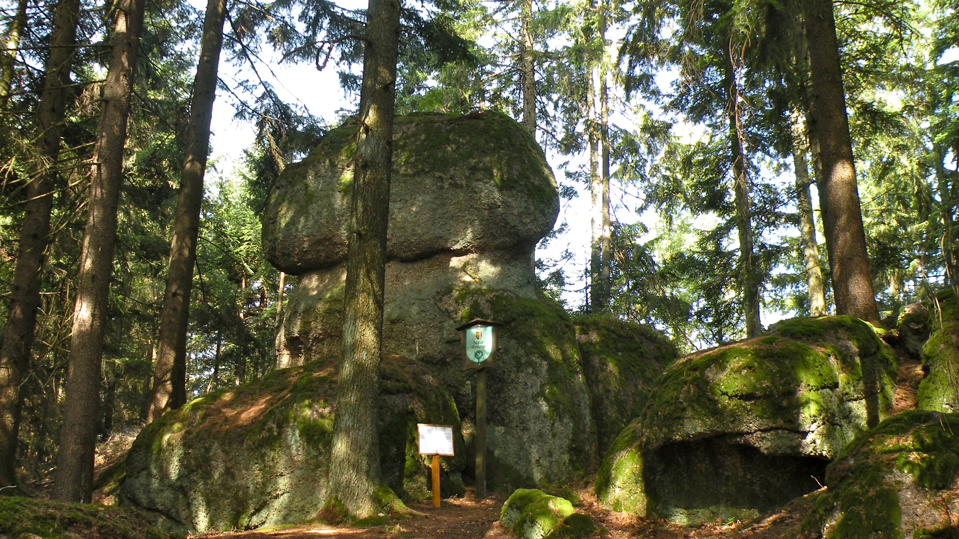 Naturdenkmal Einsiedlerstein im Naturpark Mühlviertel in der Marktgemeinde Sankt Thomas am Blasenstein im Bezirk Perg in Oberösterreich